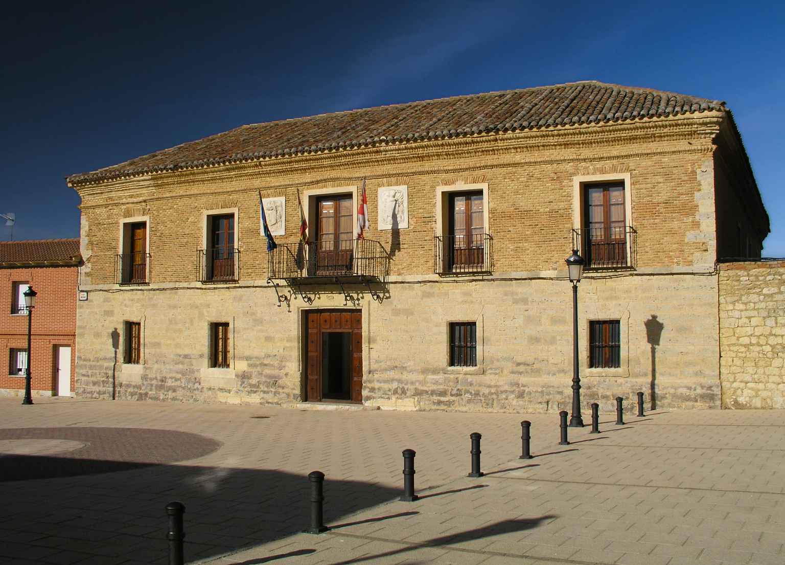 Palacio de los Cuadrilleros, Palazuelo de Vedija, Valladolid, España.